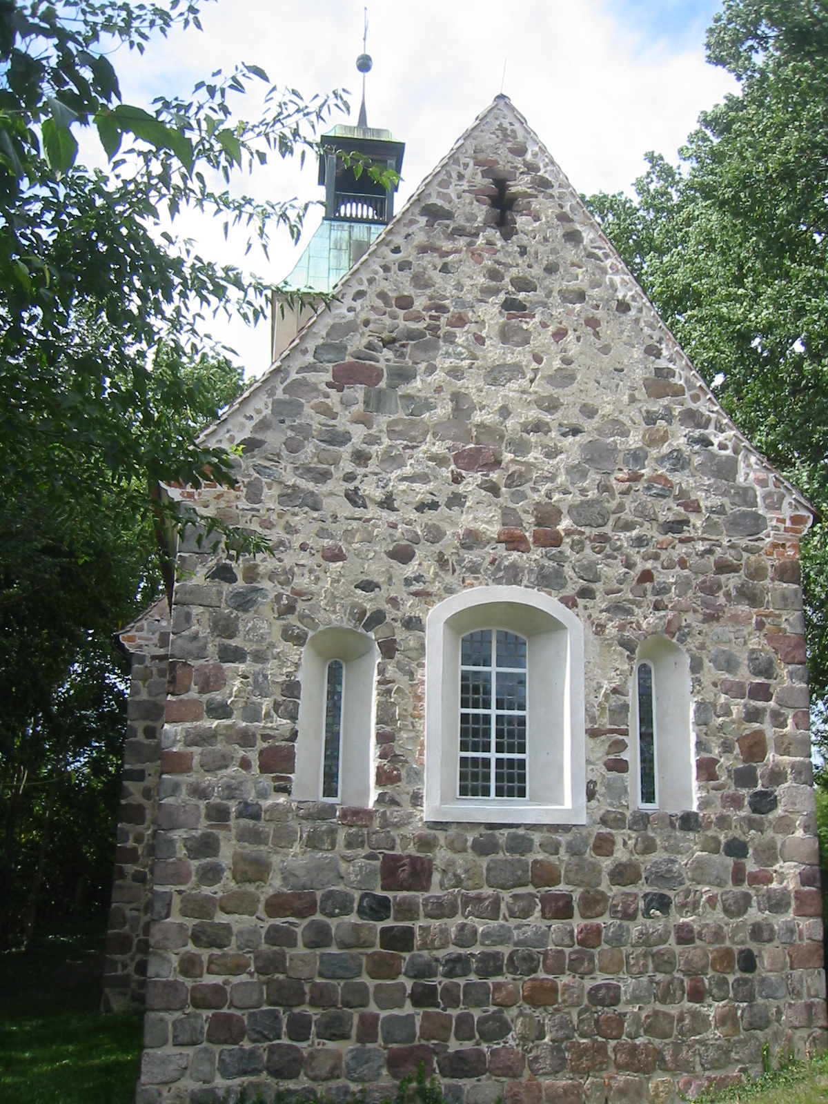 Ostgiebel der Dorfkirche in Ruhlsdorf, ein Feldsteinbau aus dem 13. Jahrhundert in Teltow (Stadt), Potsdam-Mittelmark, Brandenburg